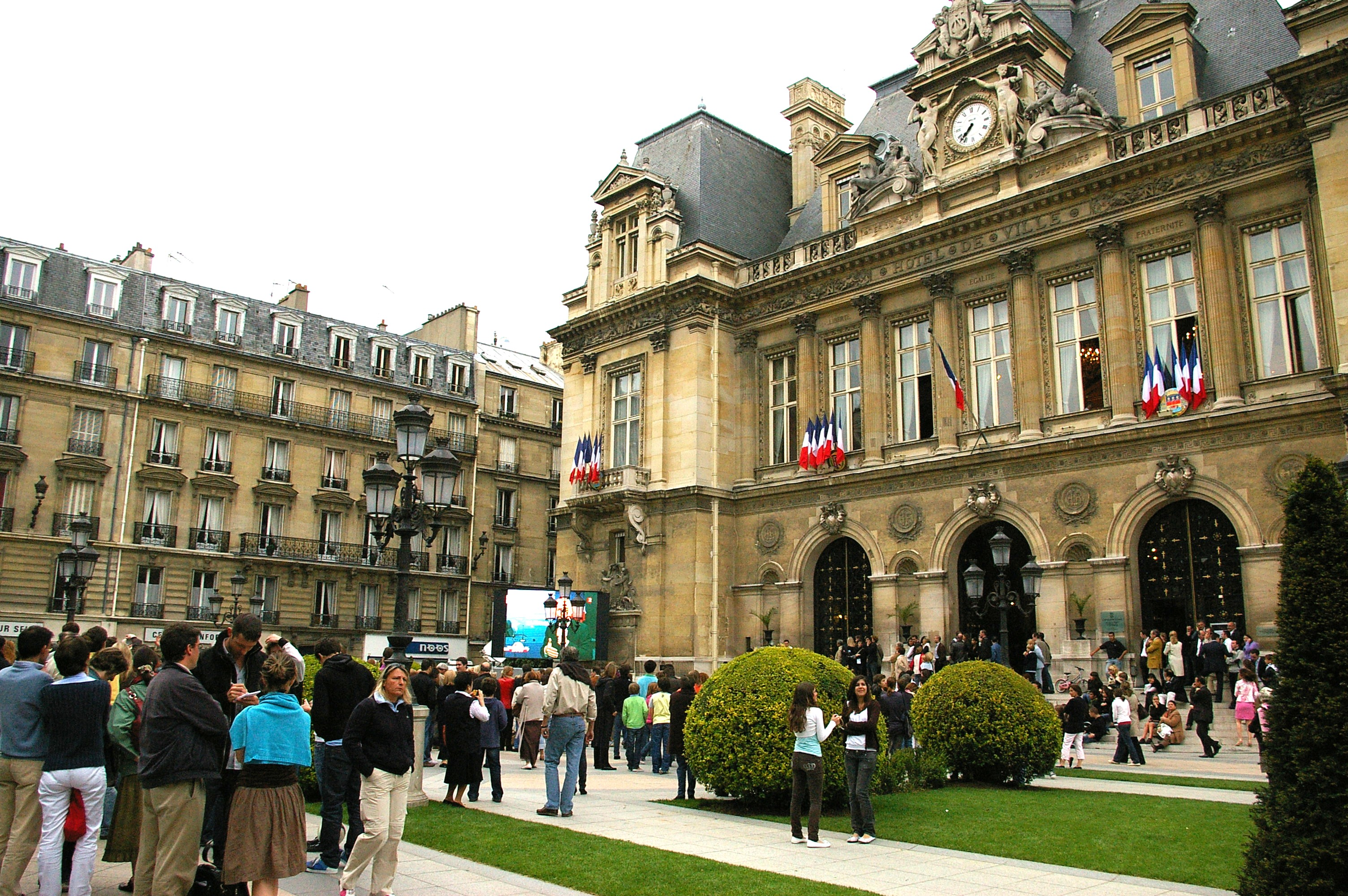 Mairie de Neuilly le soir du 6 mai 2007